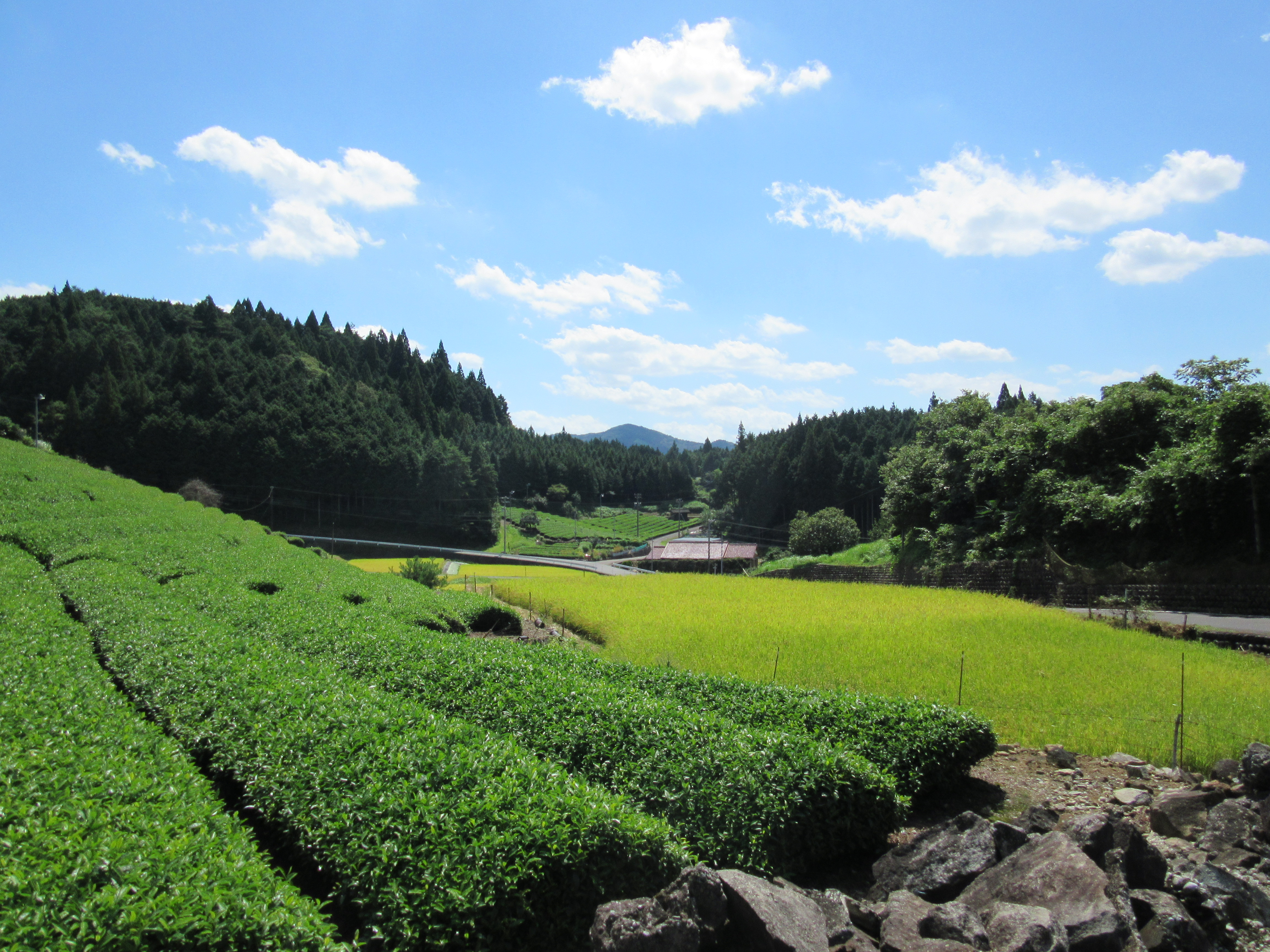 岐阜県加茂郡白川町広野地区の茶畑と水田。白川町は緑茶の名産地である